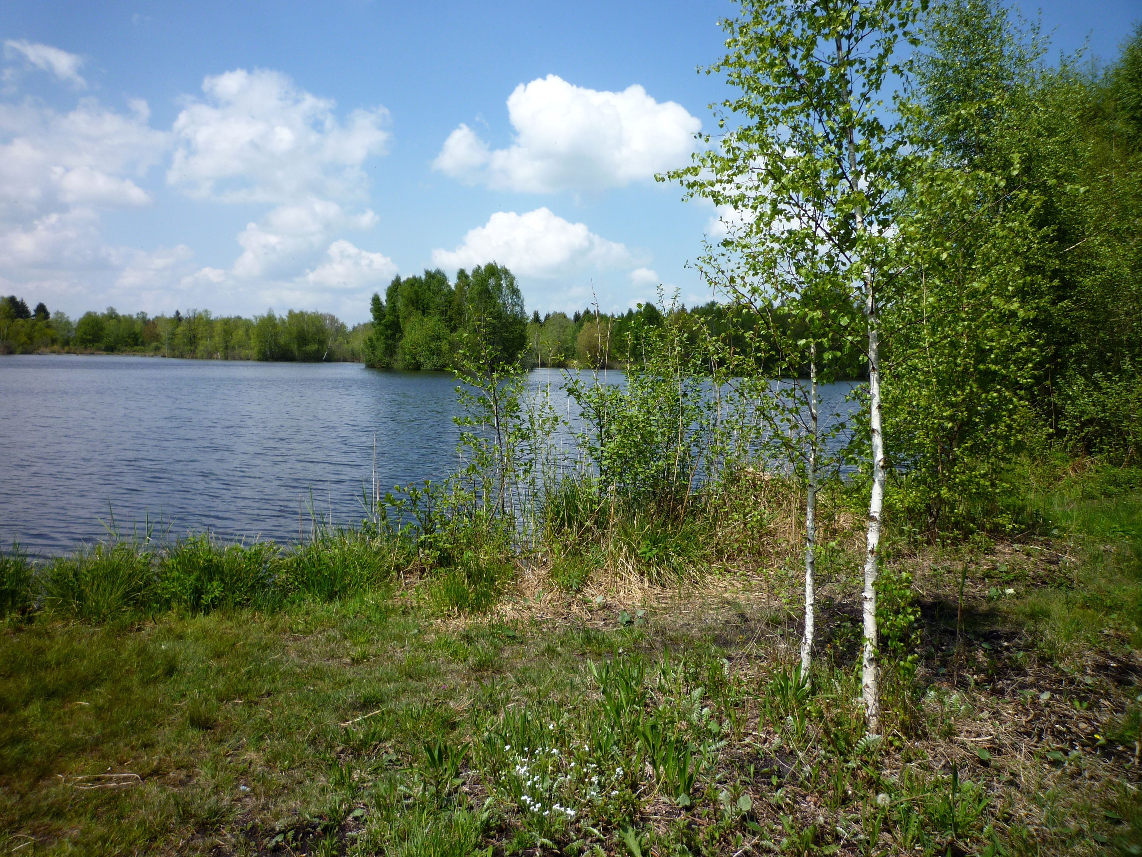 Wilhelmsdorf - See im Pfrunger Ried